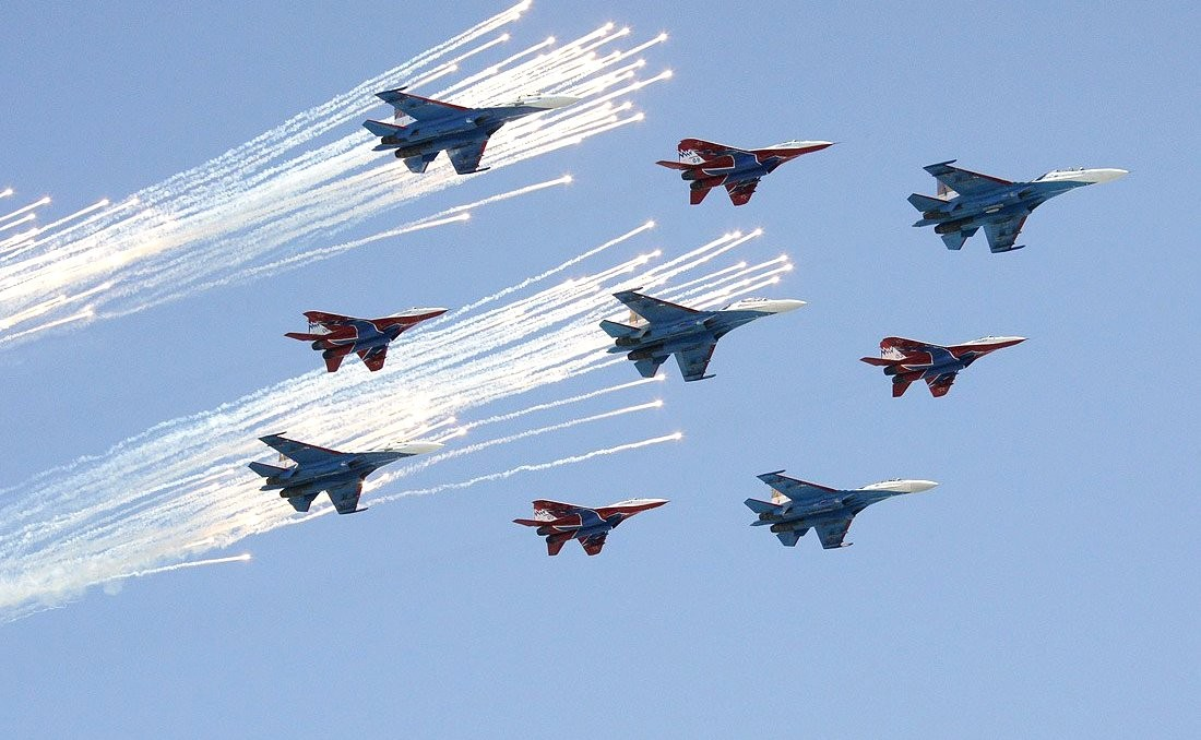 Военный парад, посвящённый 65-летию Победы в Великой Отечественной войне.